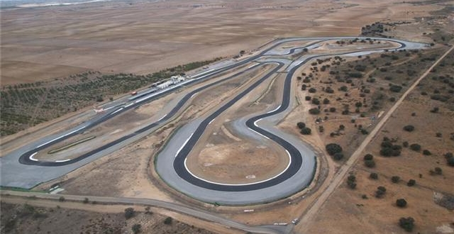 Rennstrecke Guadix